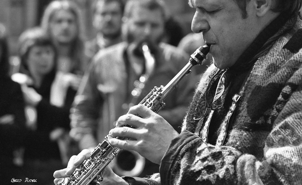 Gerd Dudek, Globe Unity Ochestra, Open Air Konzert in Wuppertal (Laurentiusplatz), 1970-er Jahre